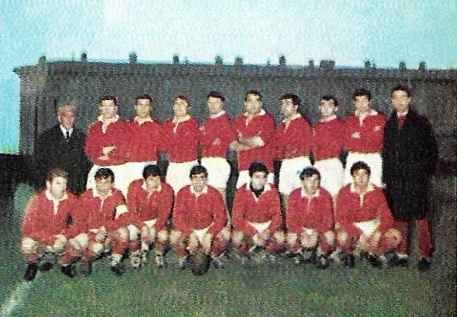 Le Petrarca Rugby Padoue en 1967 - Campioni dello Sport 1967-1968, n°491